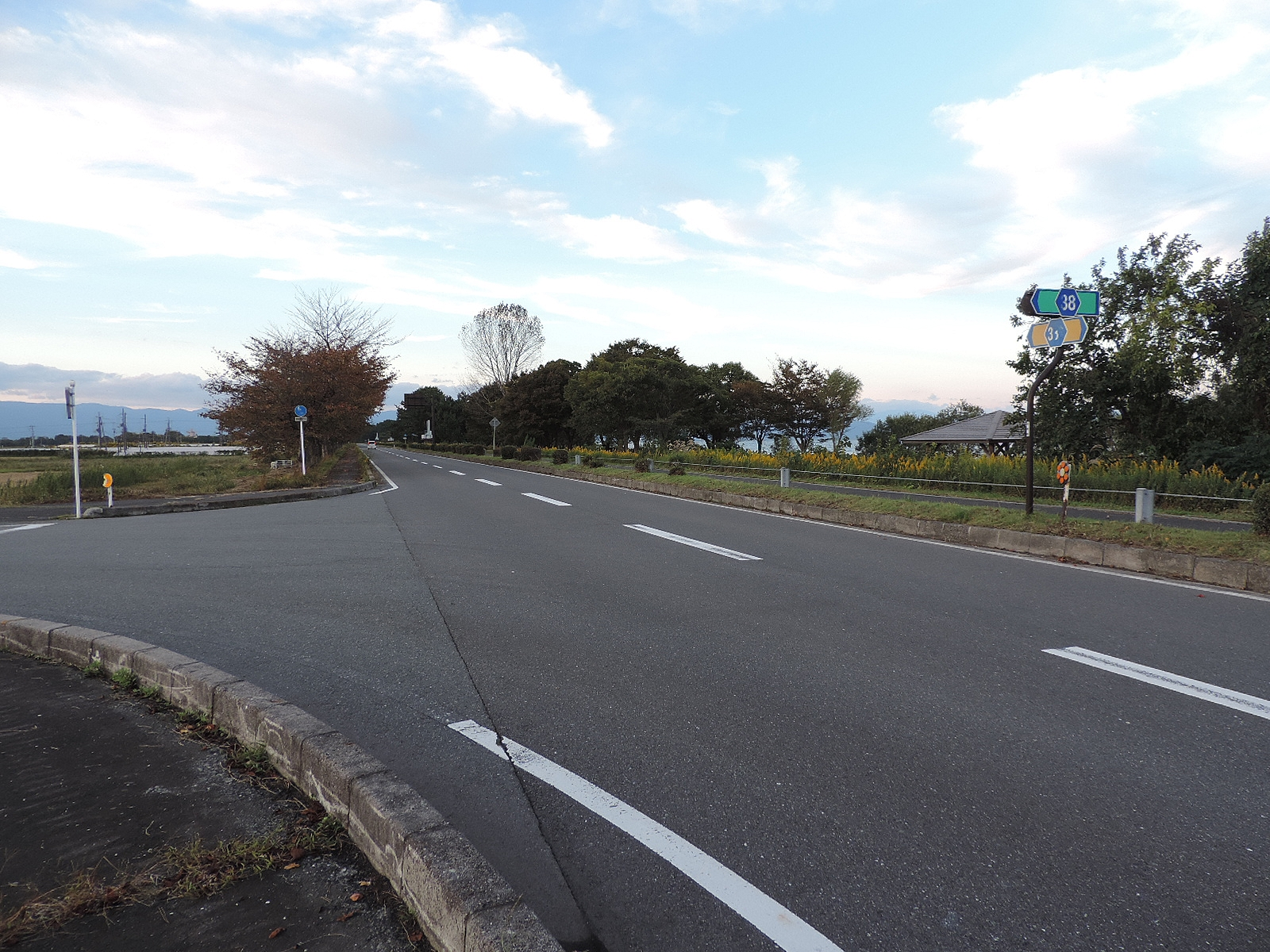 滋賀県道333号安曇川今津線（湖岸道路）。高島市新旭町太田にて。